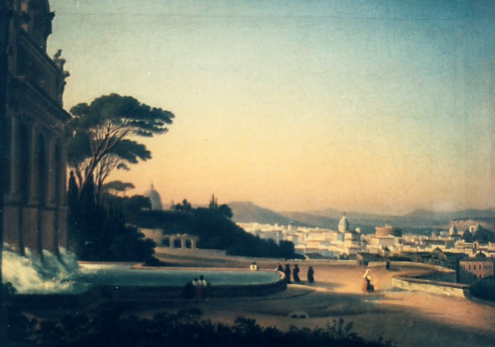 Gheorghe Tattarescu - Pe Ganicolo - Peisaj din Roma, în momentul apusului, având reprezentat în partea stângă o fântână monumentală care-şi varsă apele într-un bazin rotund iar în dreapta acesteia, arbuşti şi doi pini înalţi, Muzeul Municipiului Bucureşti, 26x35 cm.